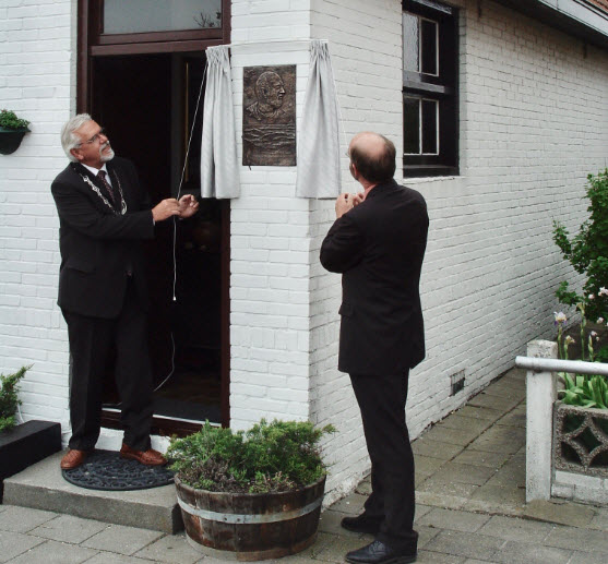 Onthulling plaquette